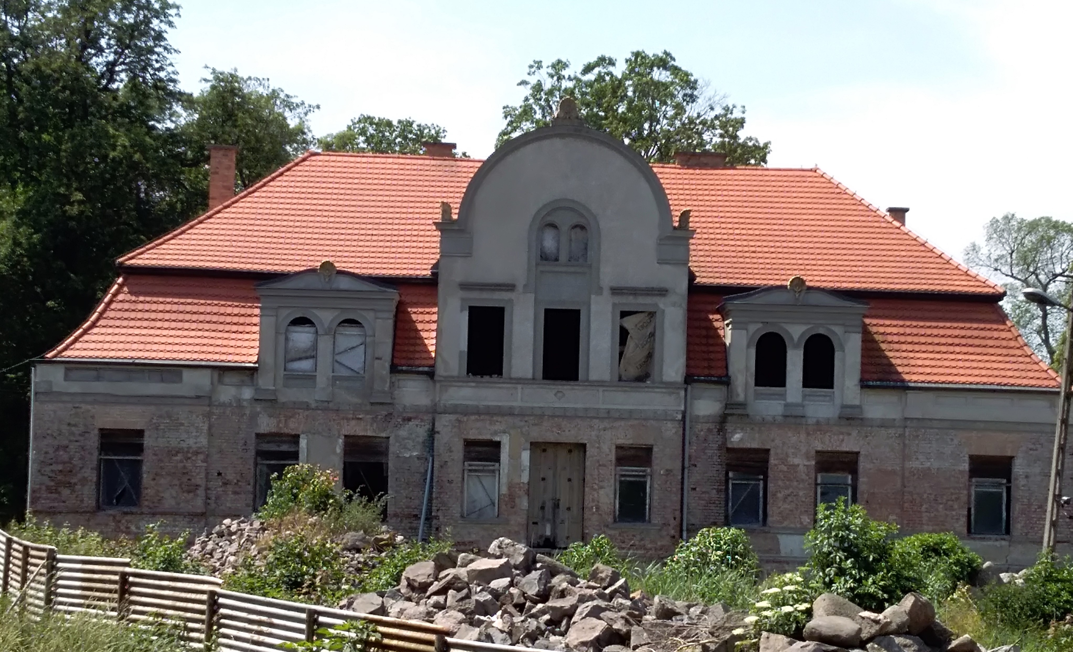 dwór - pałac z XV - XVIII wieku, przebudowany w latach 1830-1890.